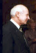 Austin H. Kiplinger